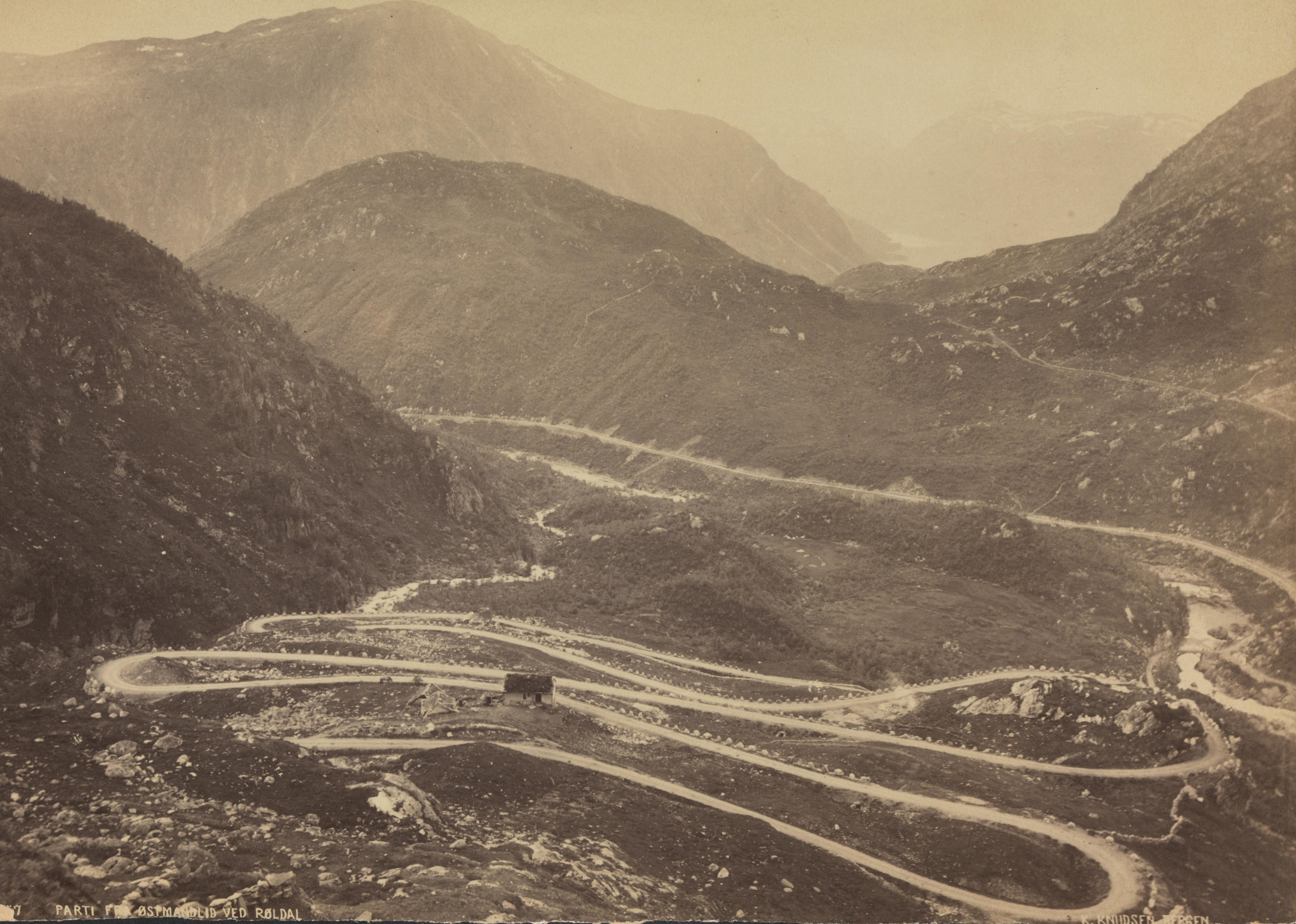 Bildet er hentet fra Nasjonalbibliotekets bildesamling Austmannlia, Odda, Hordaland